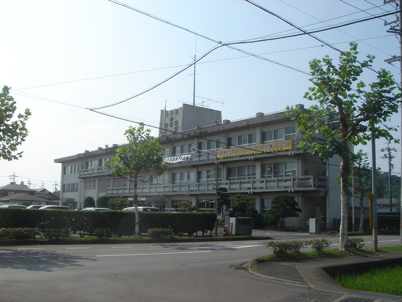 Gifu kita Police station(岐阜北警察署),Gifu,Gifu,Japan(岐阜県岐阜市)で撮影。